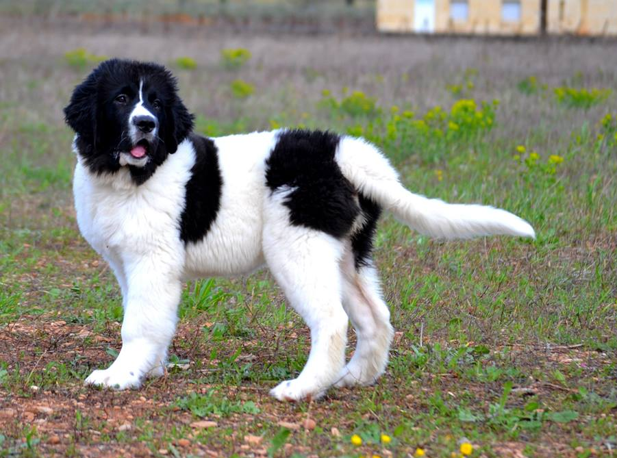 Intrepid dream des pandas des terres rouges landseer sud de la france